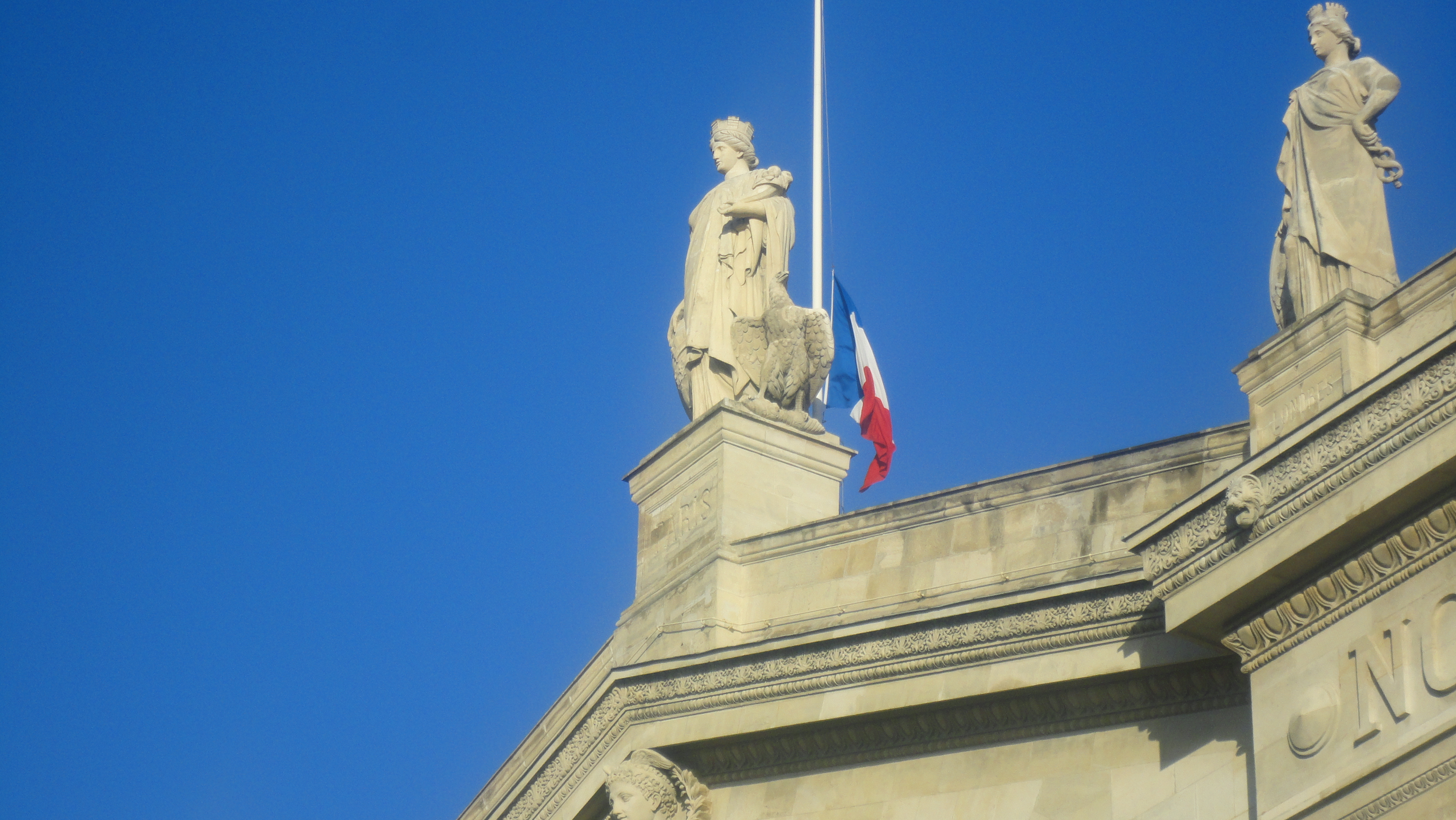 Je Suis Charlie 20150111 Gare du Nord, drapeau en berne.